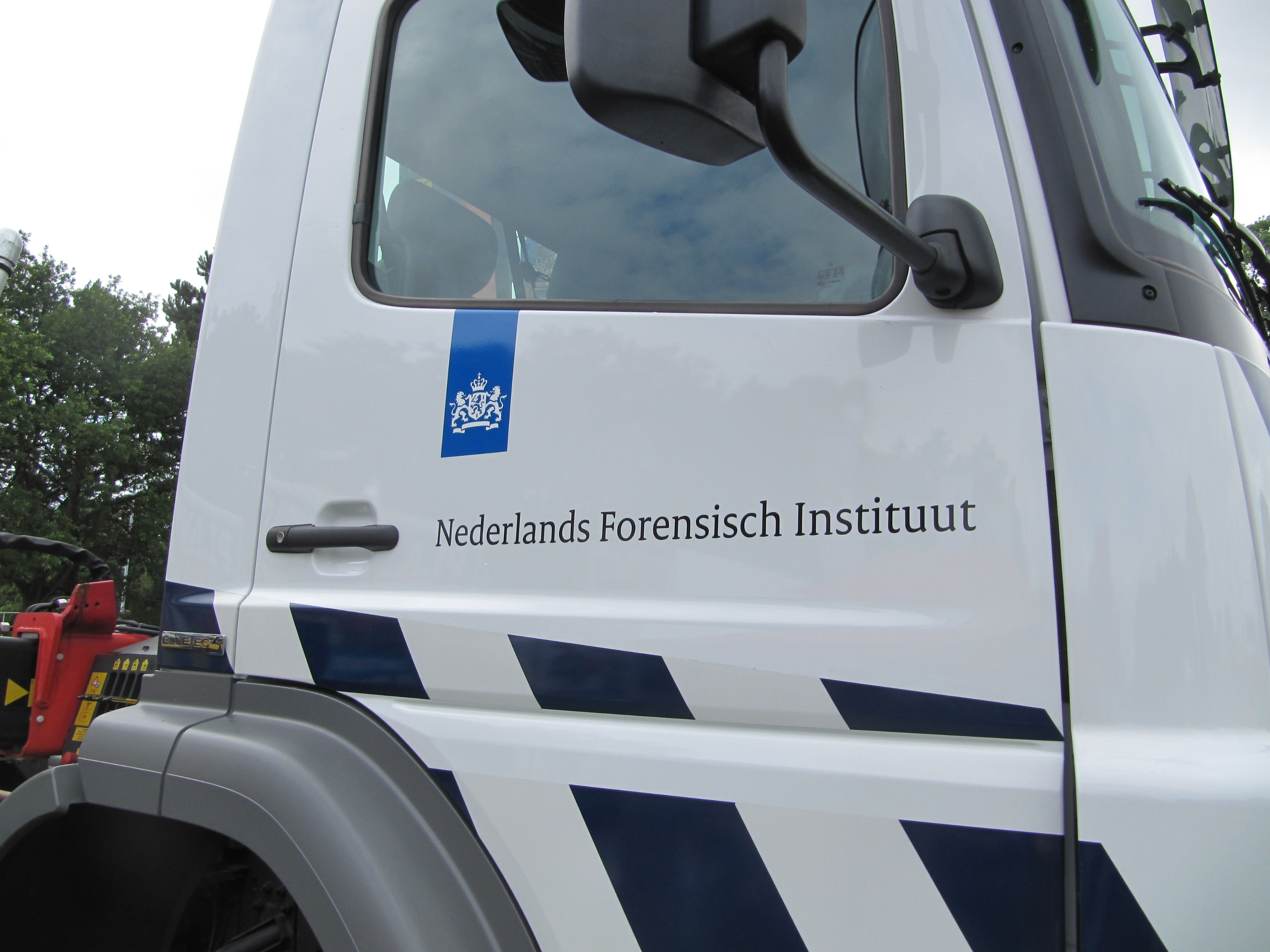 Nederlands Forensisch Instituut. Vrachtwagen op Parkpop 2012